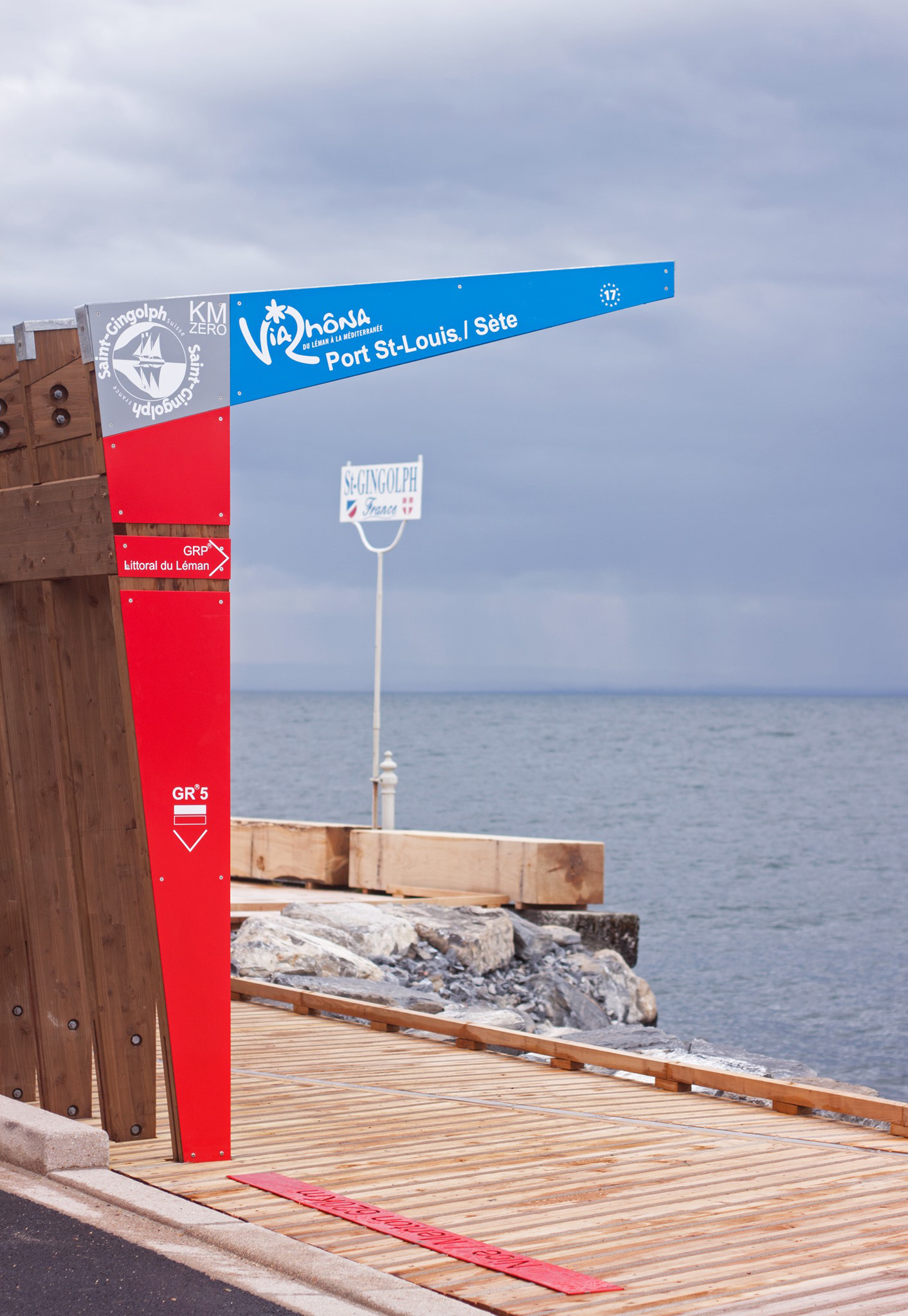 Le kilomètre zéro de la ViaRhôna et du GR©5 à Saint-Gingolph au bord du lac Léman.